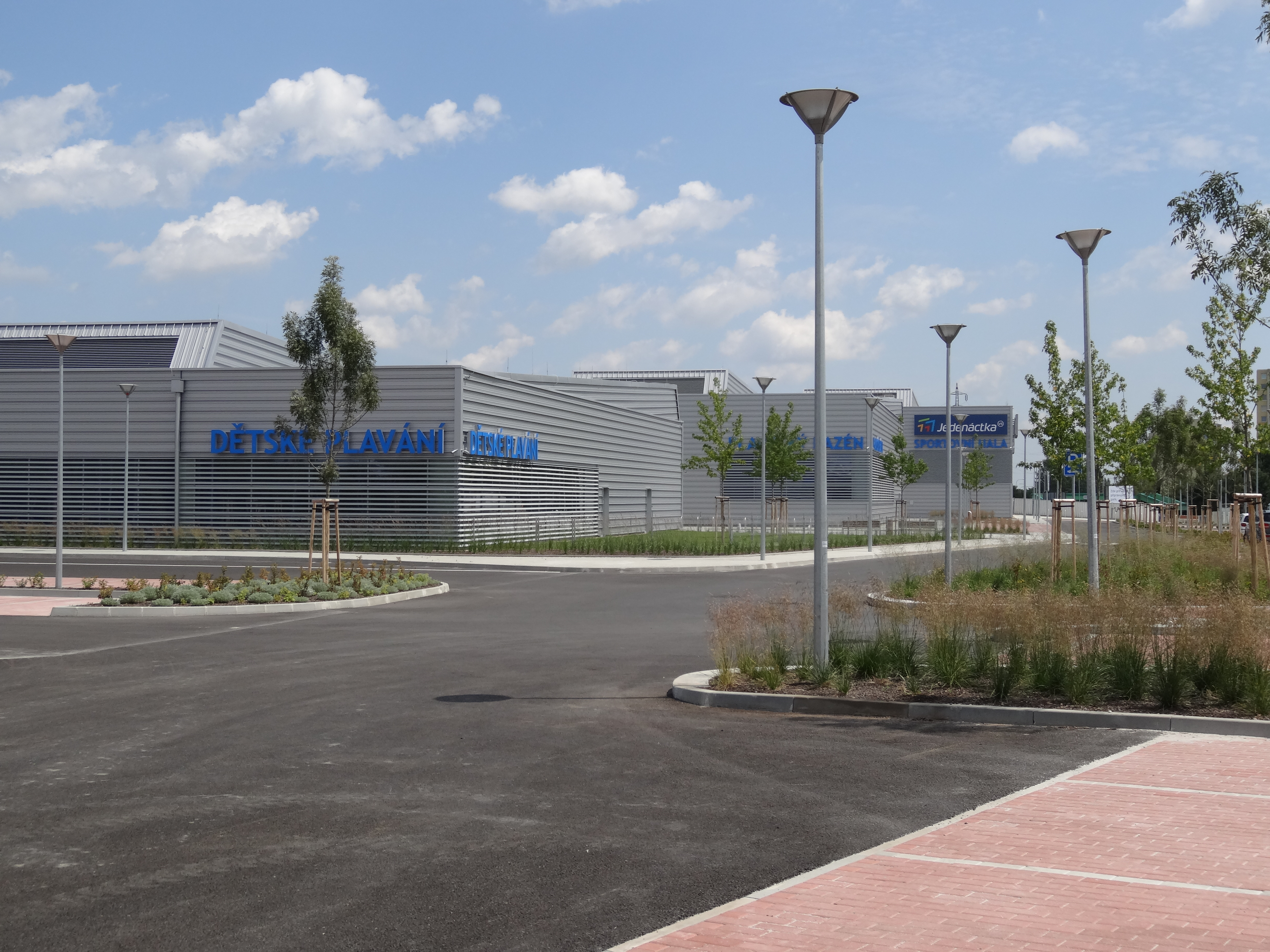 Autor Jiří Borový – IZDoprava.cz